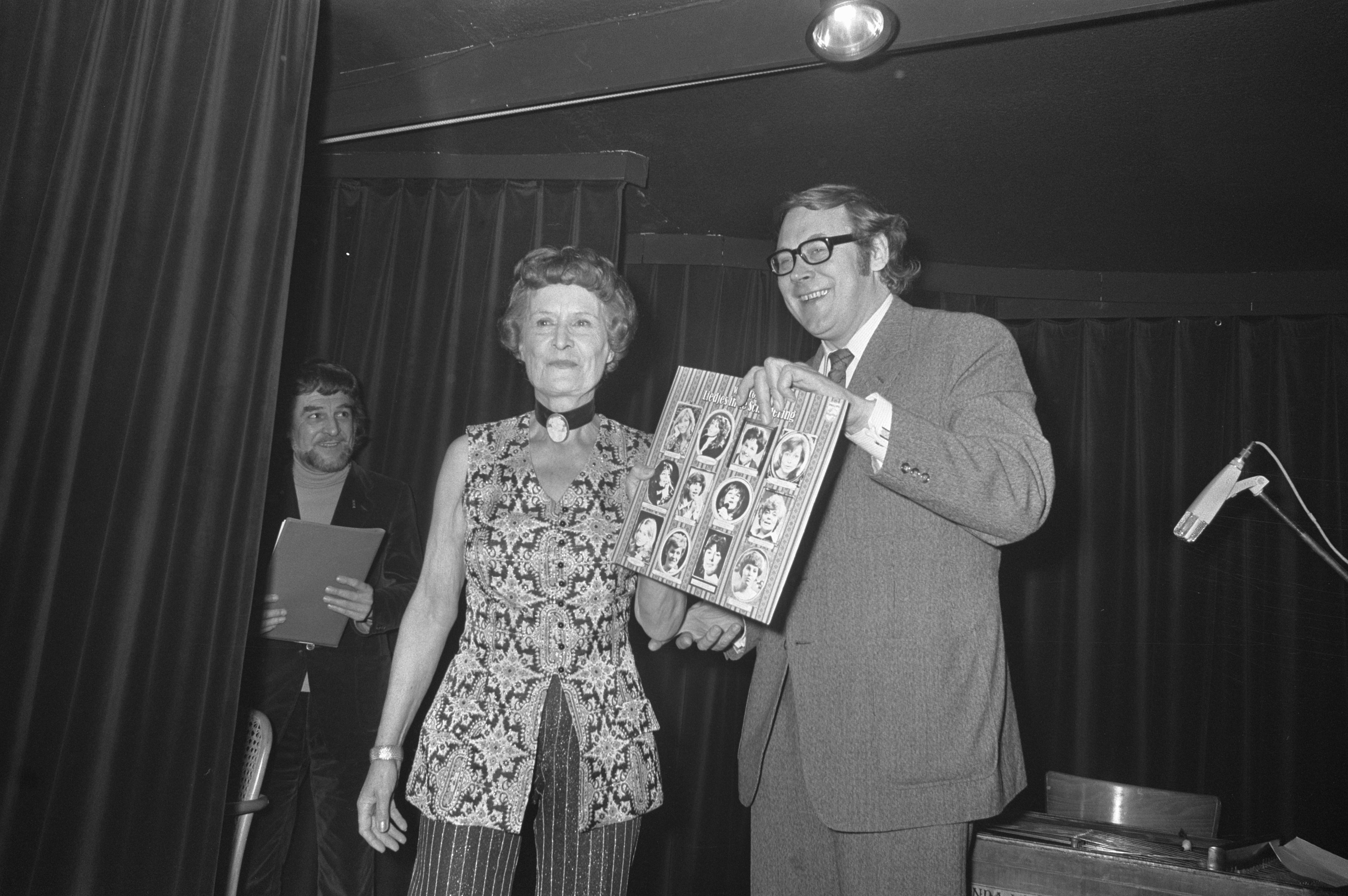 Collectie / Archief : Fotocollectie Anefo Reportage / Serie : [ onbekend ] Beschrijving : Willy Corsari krijgt plaat in Bellevue, Willy Corsari met Gerrit den Braber. In de coulissen Wim Ibo. Datum : 31 oktober 1972 Instellingsnaam : Bellevue Fotograaf : Croes, Rob C. / Anefo Auteursrechthebbende : Nationaal Archief Materiaalsoort : Negatief (zwart/wit) Nummer archiefinventaris : bekijk toegang 2.24.01.05 Bestanddeelnummer : 925-9888